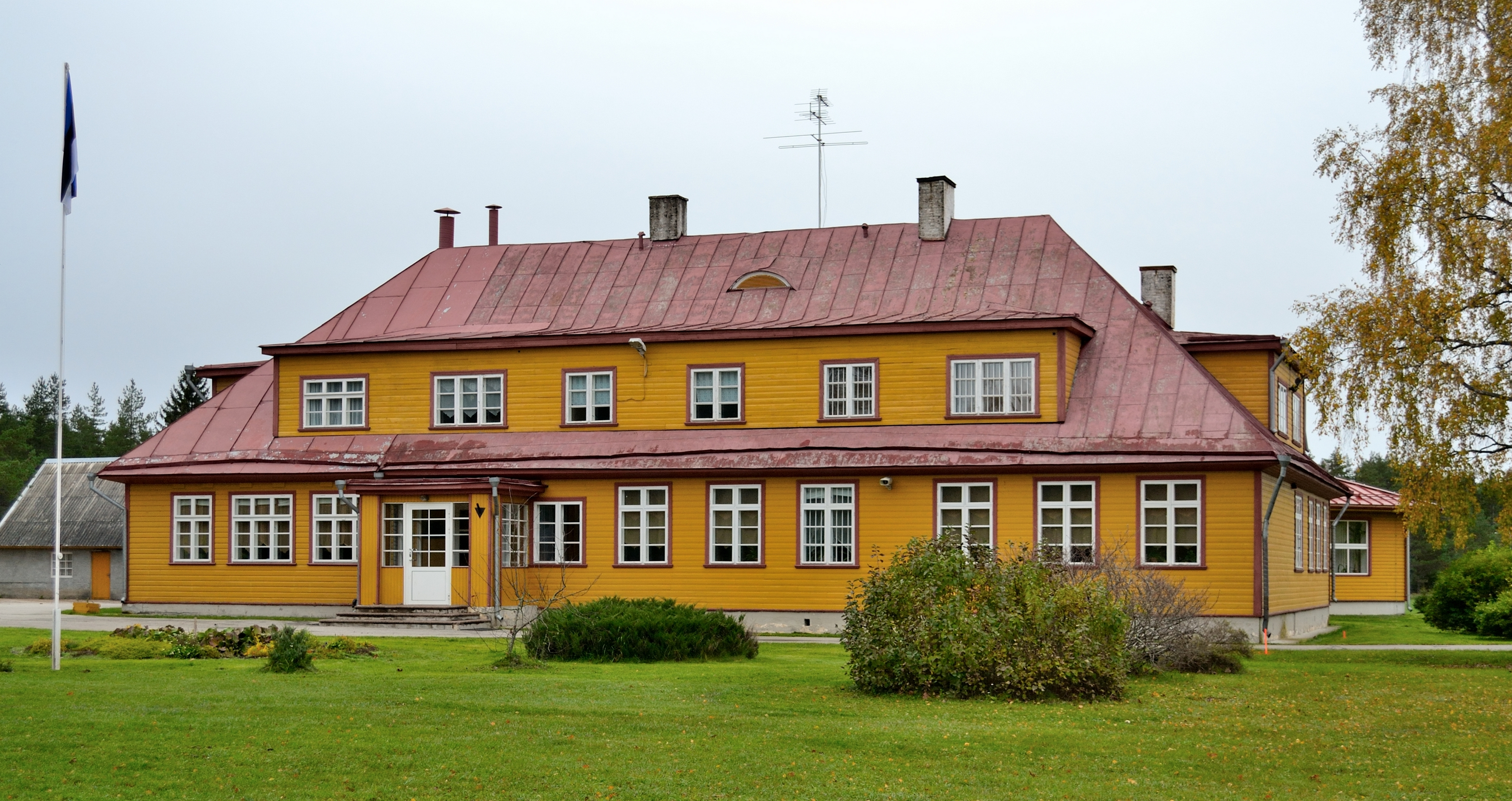 Kernu põhikool